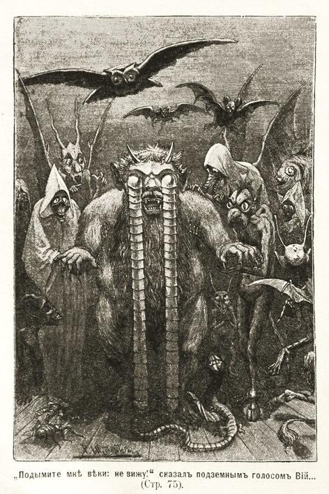 Вий. Рисунок из книги: Н. Гоголь; рис. Р. Штейна — Электрон. копия печ. публикации: СПб., 1901. — Из коллекции томского краеведа Эдуарда Кондратьевича Майданюка.